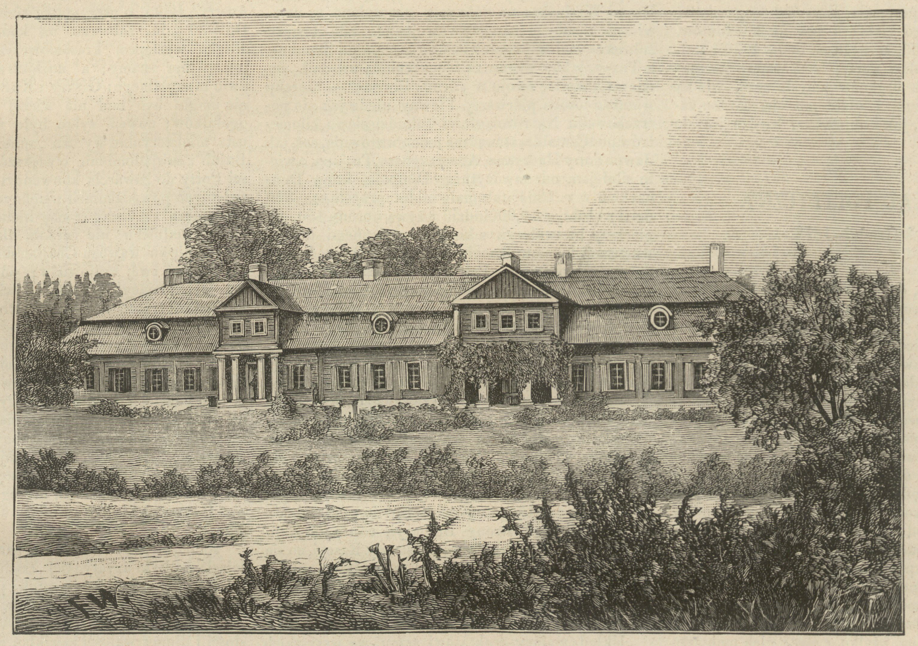 Беларуская (тарашкевіца): Варонча (Varonča), сядзіба Несялоўскіх (Niesiałoŭski)